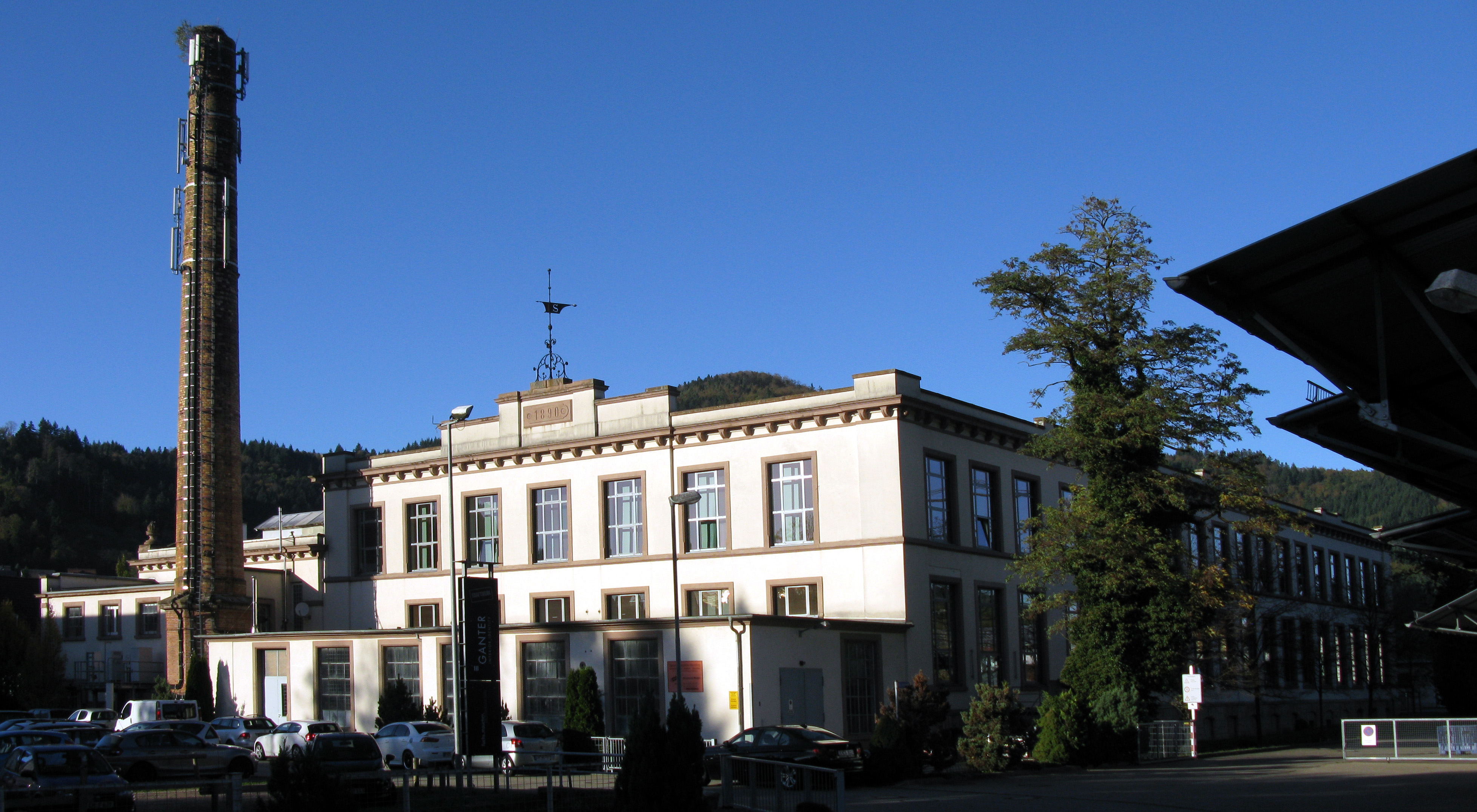 Frühere Kollnauer Baumwollspinnerei und Weberei (KSW), heute Gewerbegebiet